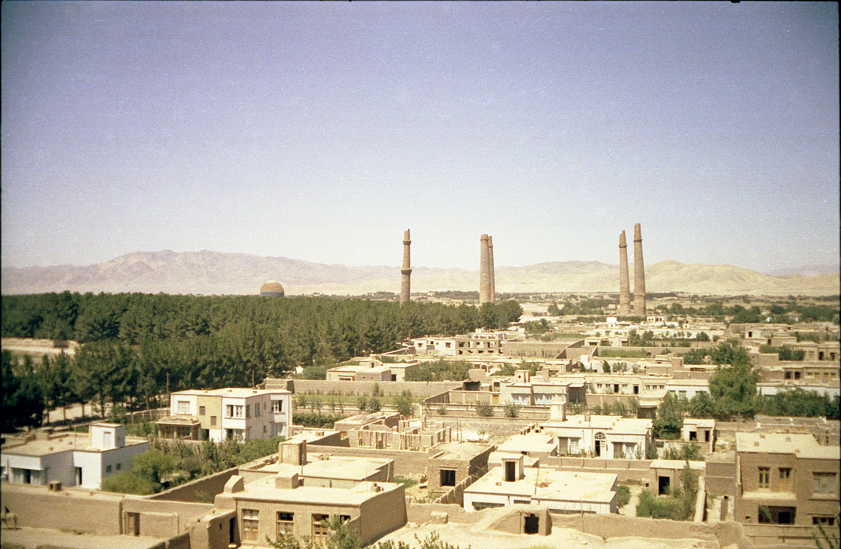 Afghanistan, herat vue générale en 1969